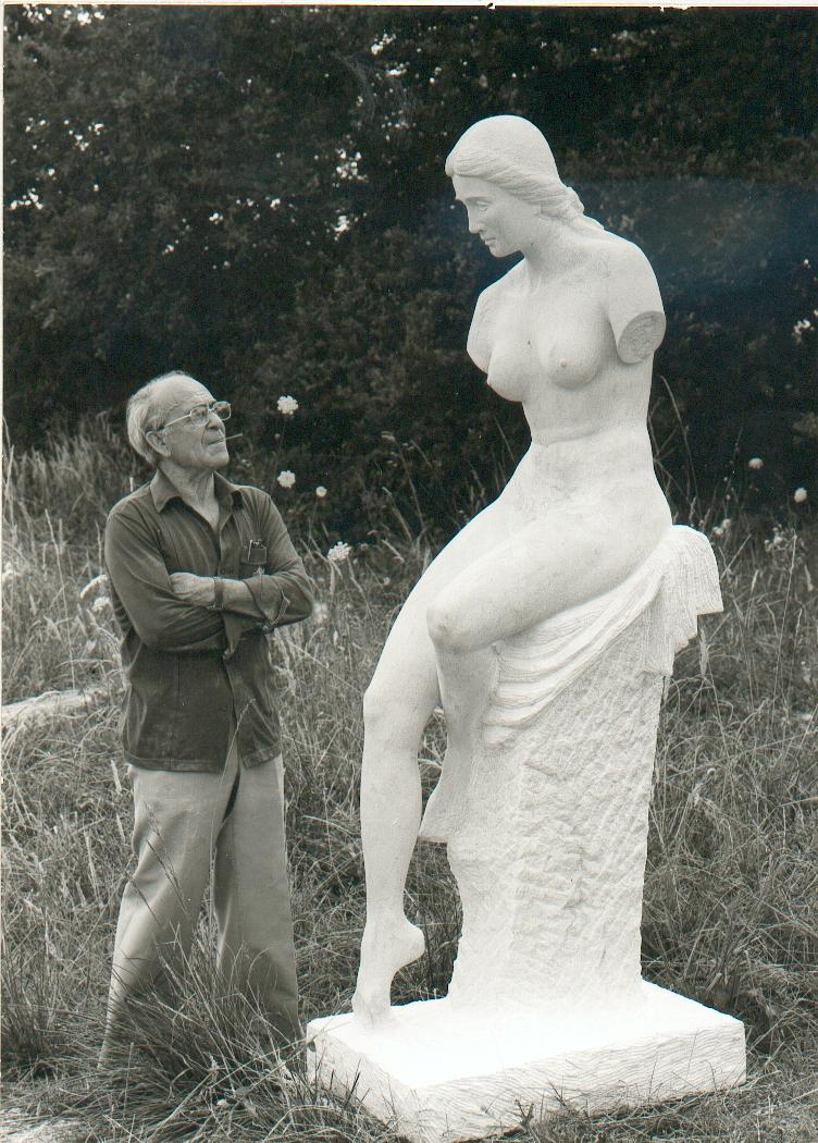 antonio alos